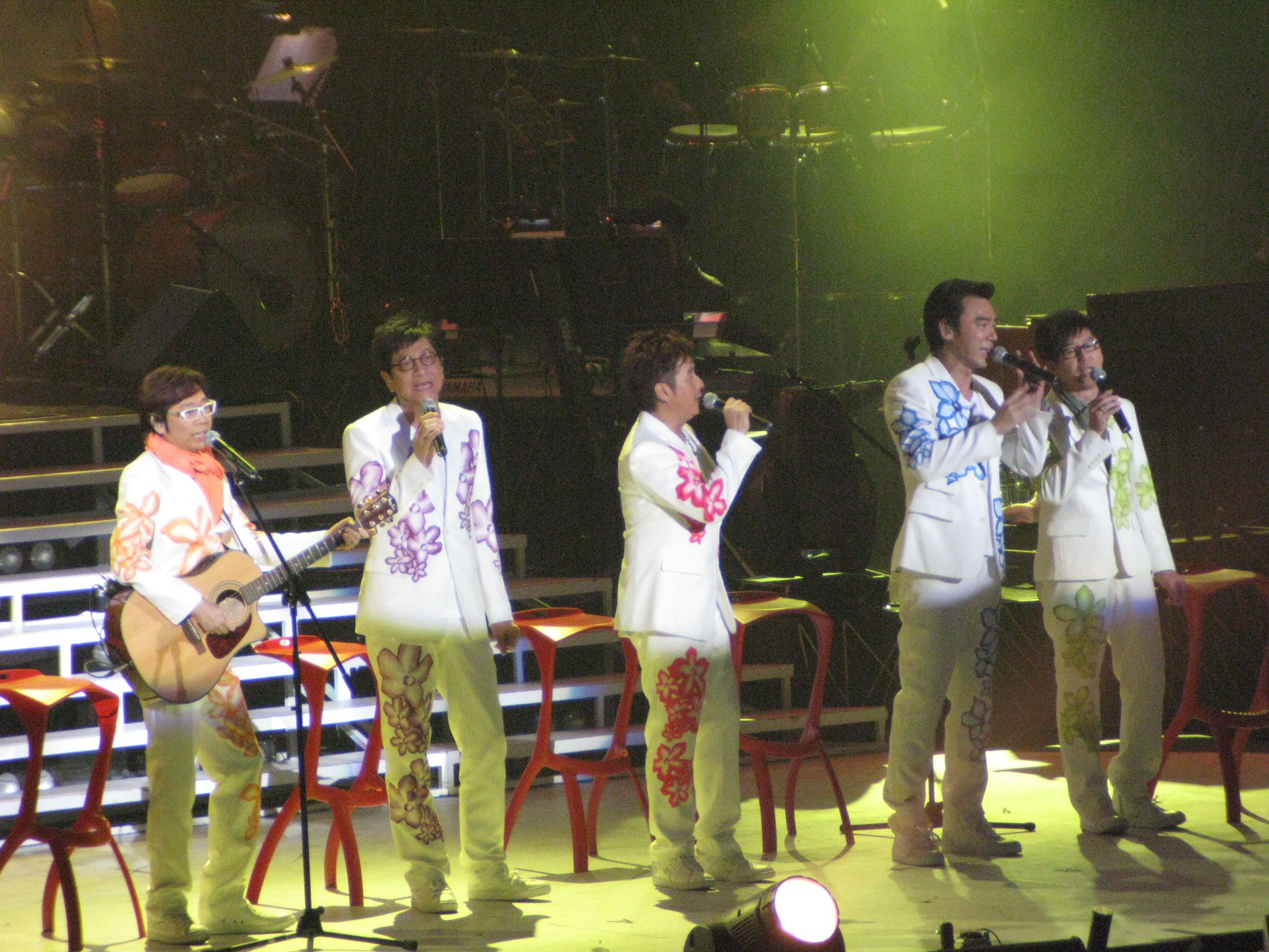 中文（香港）: 香港溫拿樂隊，攝於2011年《溫拿38大躍進演唱會》中